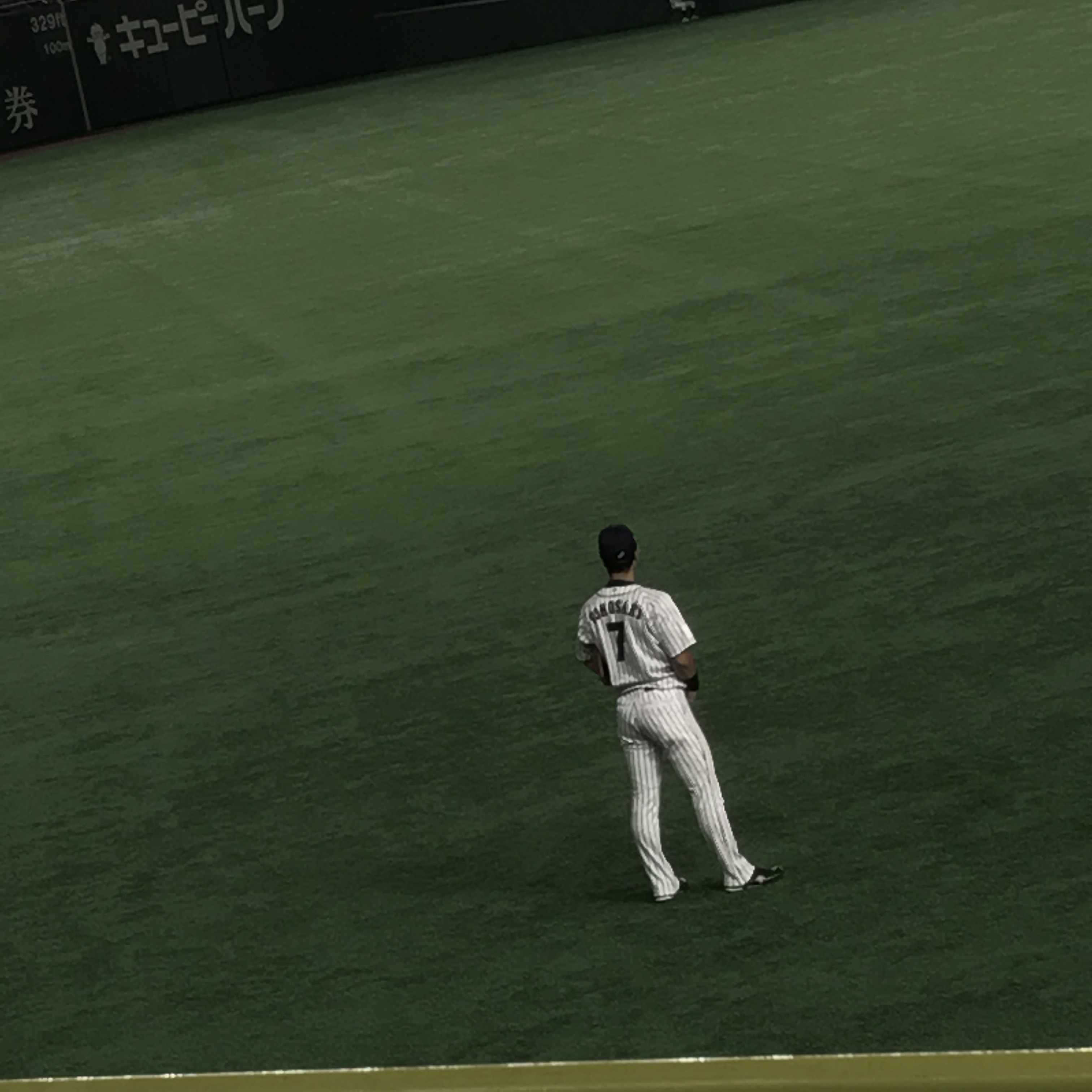 2017 アジア プロ野球チャンピオンシップ決勝戦で日本代表（侍ジャパン）としてレフト守備につく外崎修汰。